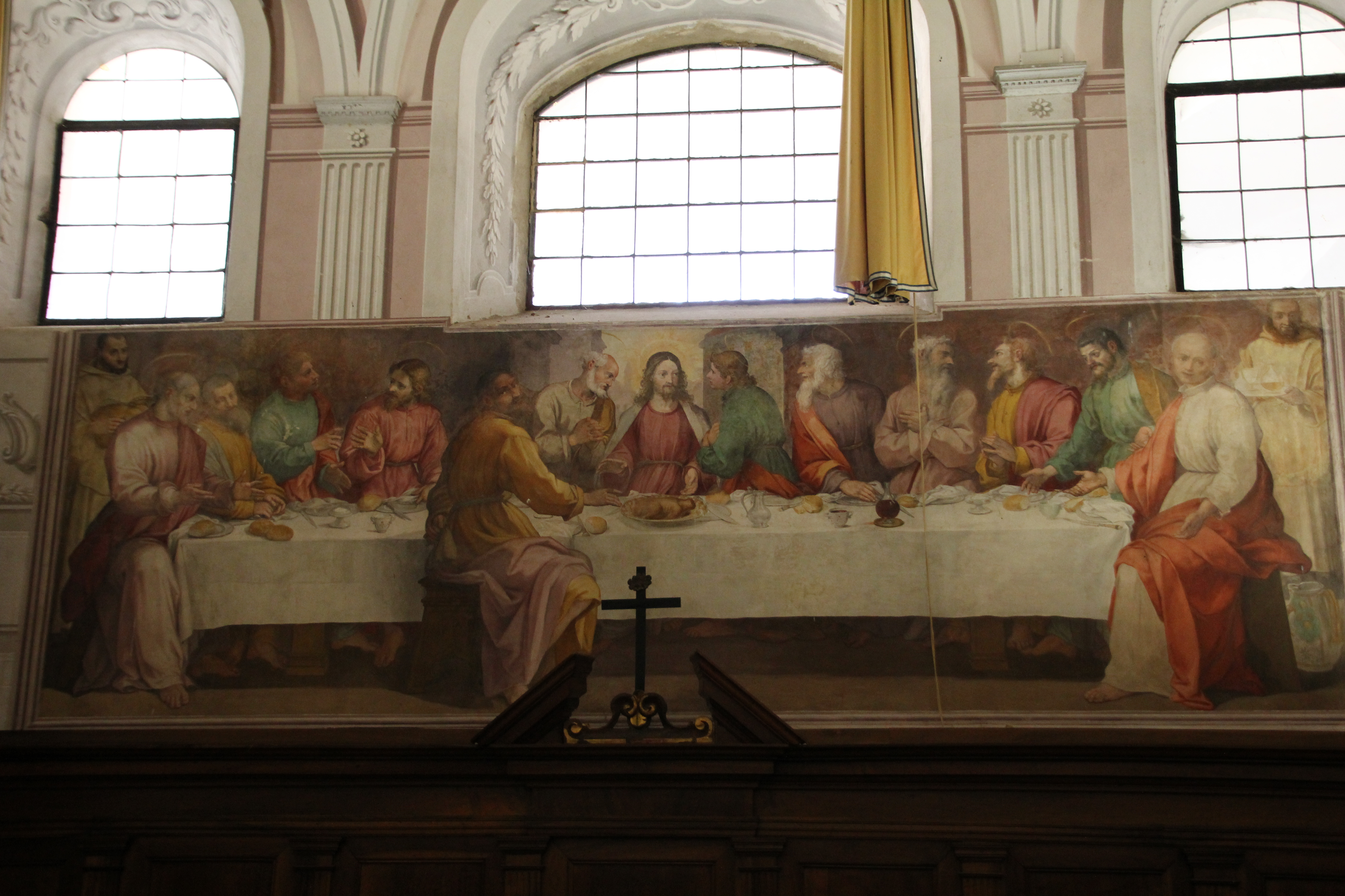 Calci, certosa di Pisa - Bernardino Poccetti - Ultima cena